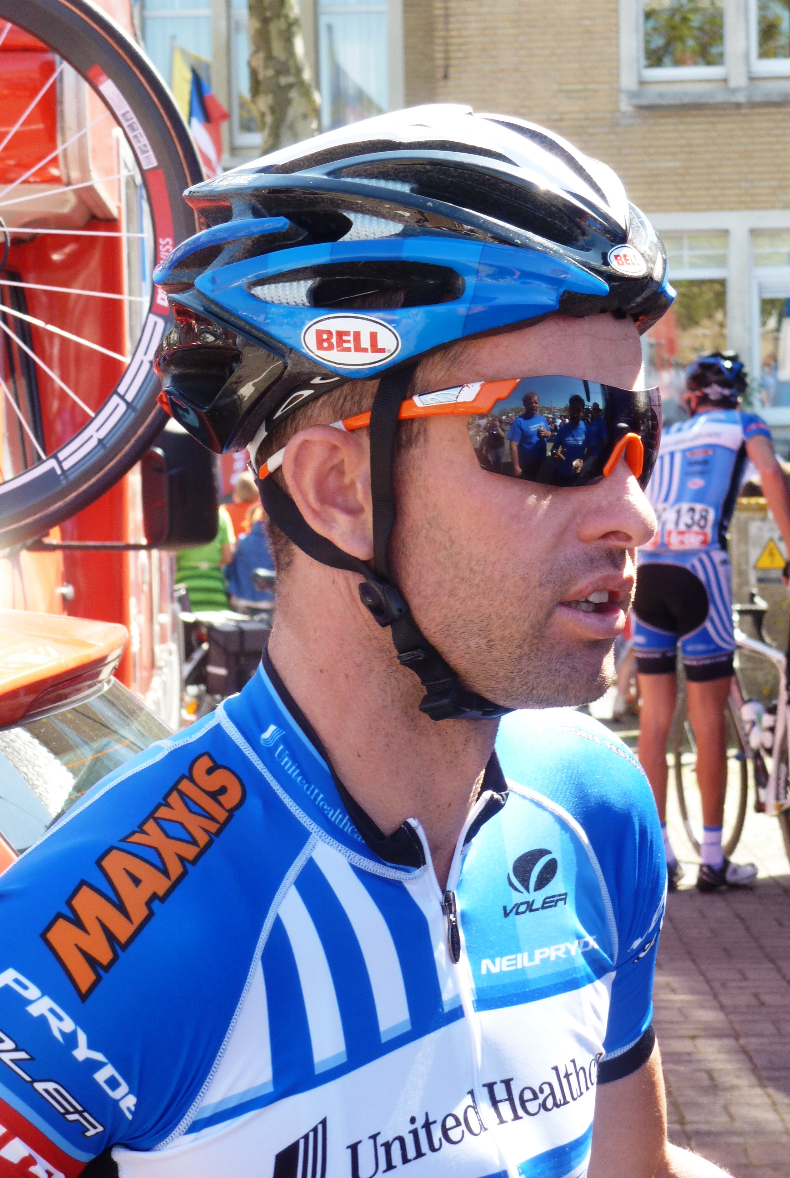 Philip Deignan, irischer Radrennfahrer